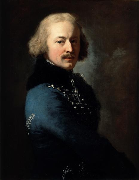 Carl Wilhelm Ferdinand von Funck